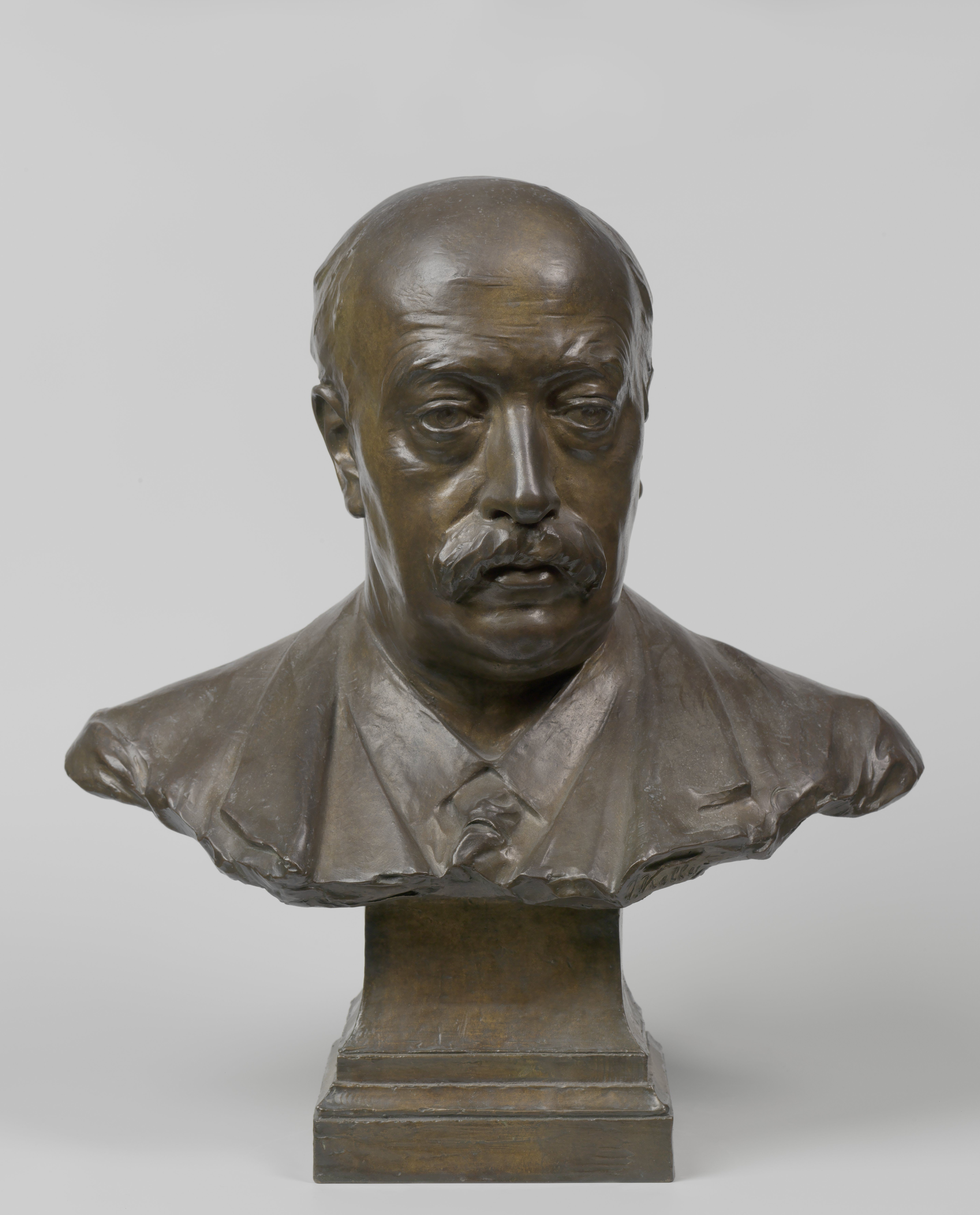 IdentificatieTitel(s): Borstbeeld van Gerard Keller (1829-1899), letterkundigeObjecttype: beeldhouwwerk Objectnummer: BK-B-112VervaardigingVervaardiger: beeldhouwer: Johan KellerDatering: ca. 1840 - ca. 1900Materiaal: brons Techniek: gietenAfmetingen: h 52 cm. (incl. sokkel) × h 37 cm. (excl. sokkel) × b 48 cm. × d 25 cm. × g 22,8 kgOnderwerpWie: Gerard KellerVerwerving en rechtenCredit line: Schenking van KellerVerwerving: schenking jul-1912Copyright: Publiek domein